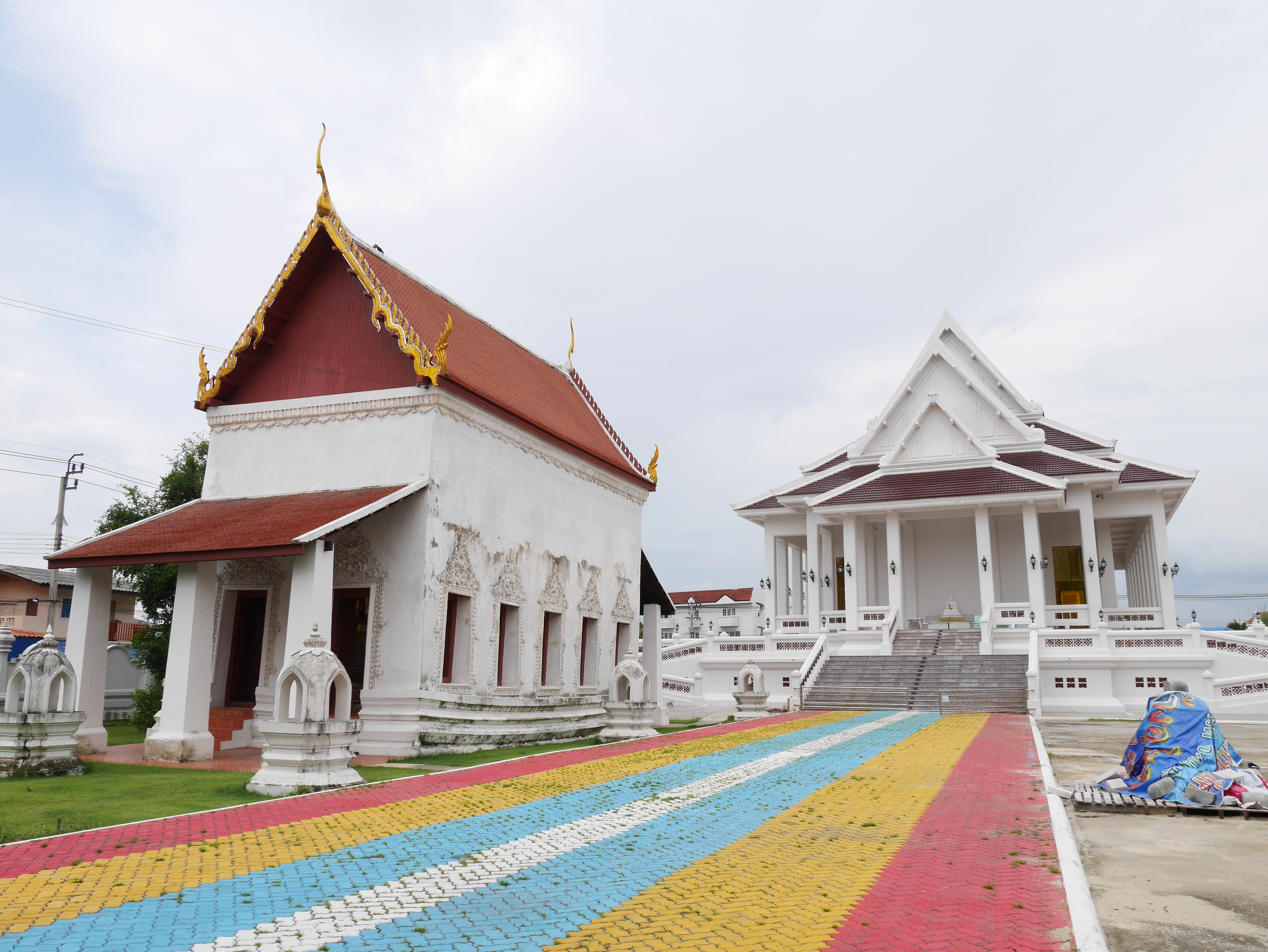 วัดกู้